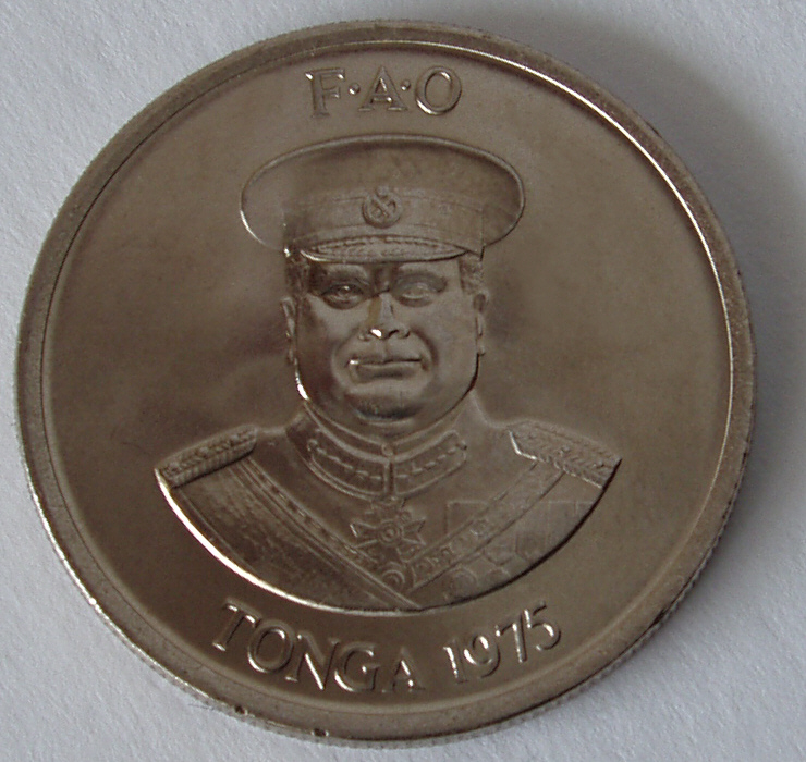 Tonga, 10 Seniti, 1975, back, d=23.6 mm, cu/ni